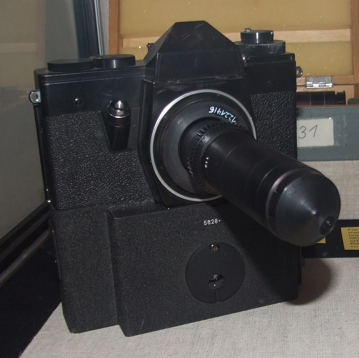 Kamera mit Sonderobjektiv SO-3.5.1 zum konspirativen Fotografieren. Das Objektiv konnte auf eine geräuscharme Spiegelreflexkamera geschraubt werden. Damit war es möglich, durch ein Loch von 1 cm Durchmesser zu fotografieren.